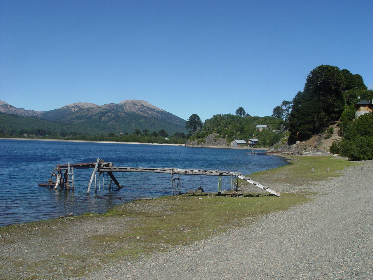 Vista del lago Moquehue (Provincia del Neuquen) en su lado norte.